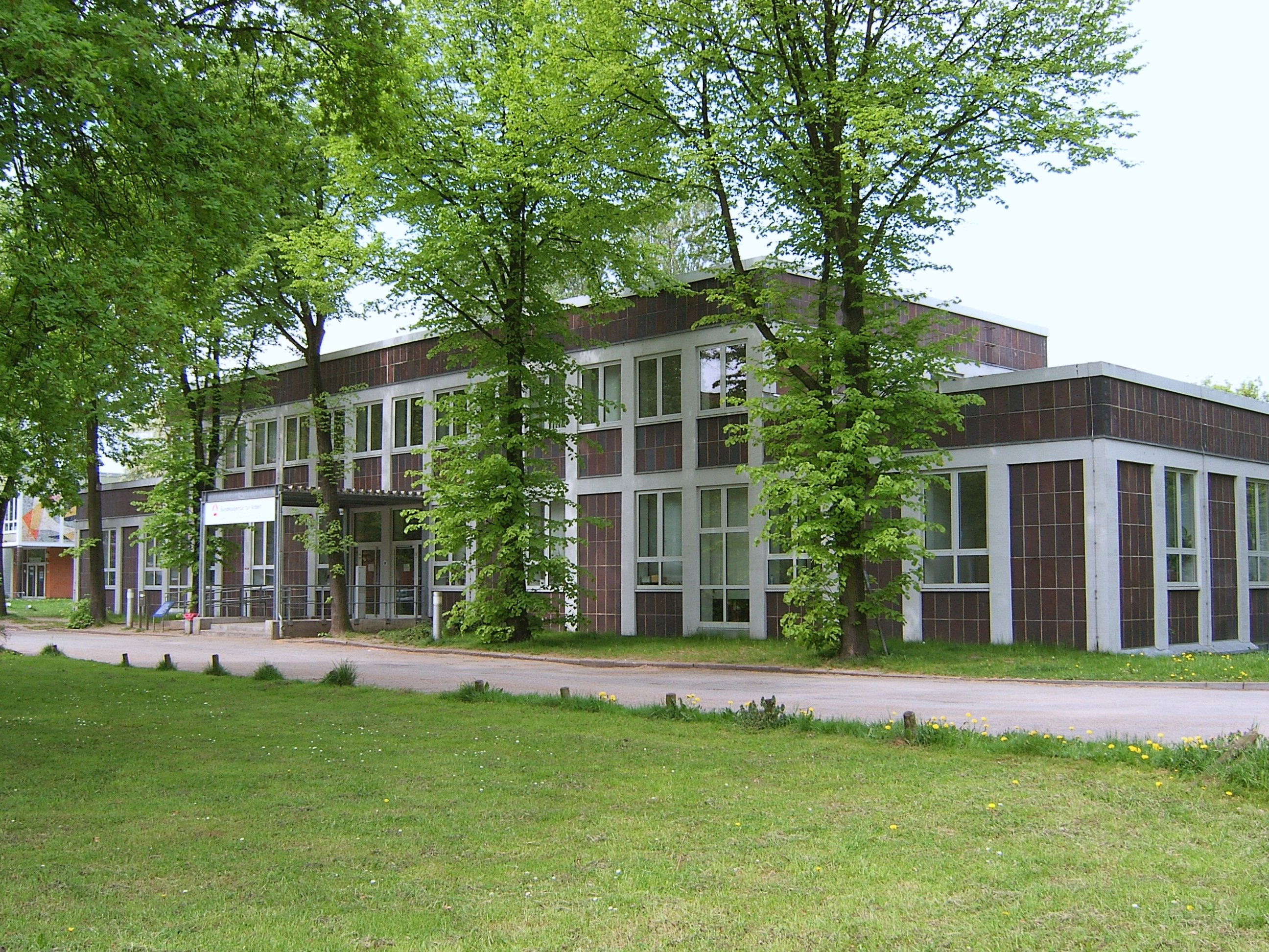 Hamburg, Altona, Arbeitsamt This is a photograph of an architectural monument.